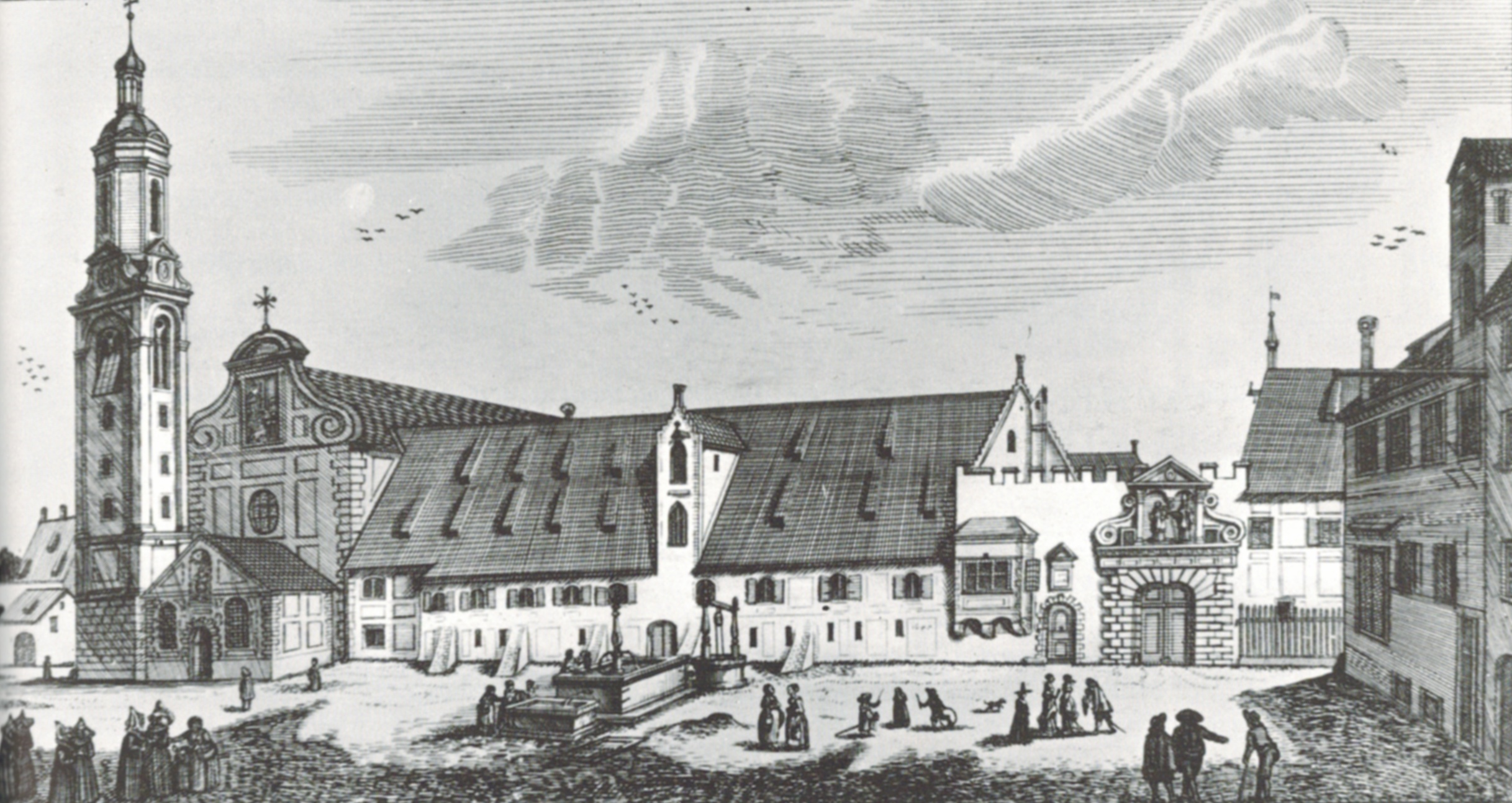 Kupferstich des Klosters St. Stephan in Augsburg